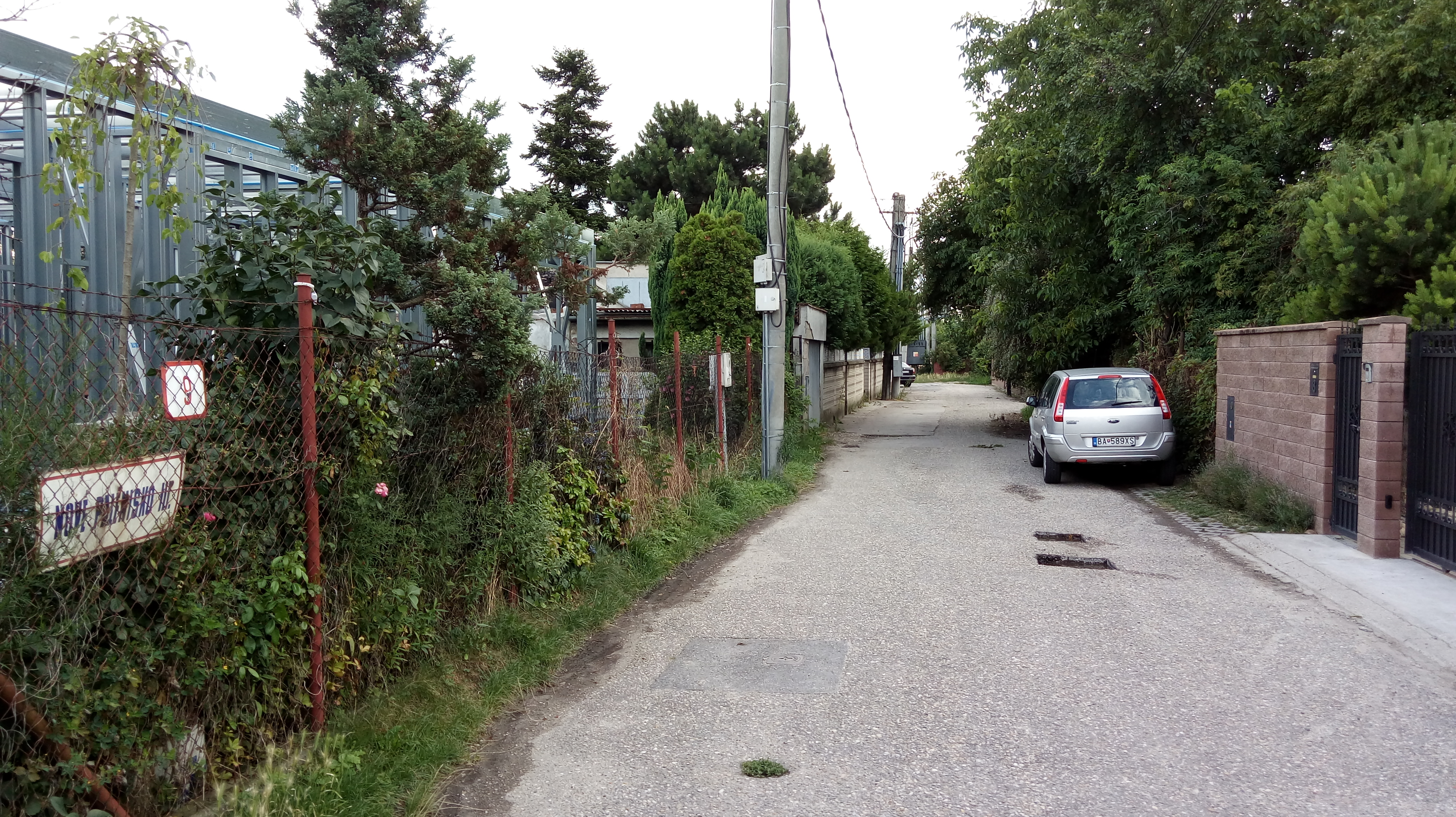 Nové pálenisko, Ružinov, Bratislava